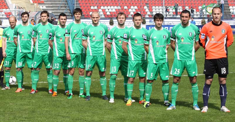 Стартовый состав ФК «Томь» на игру с ФК «Волга» 21/04/2012